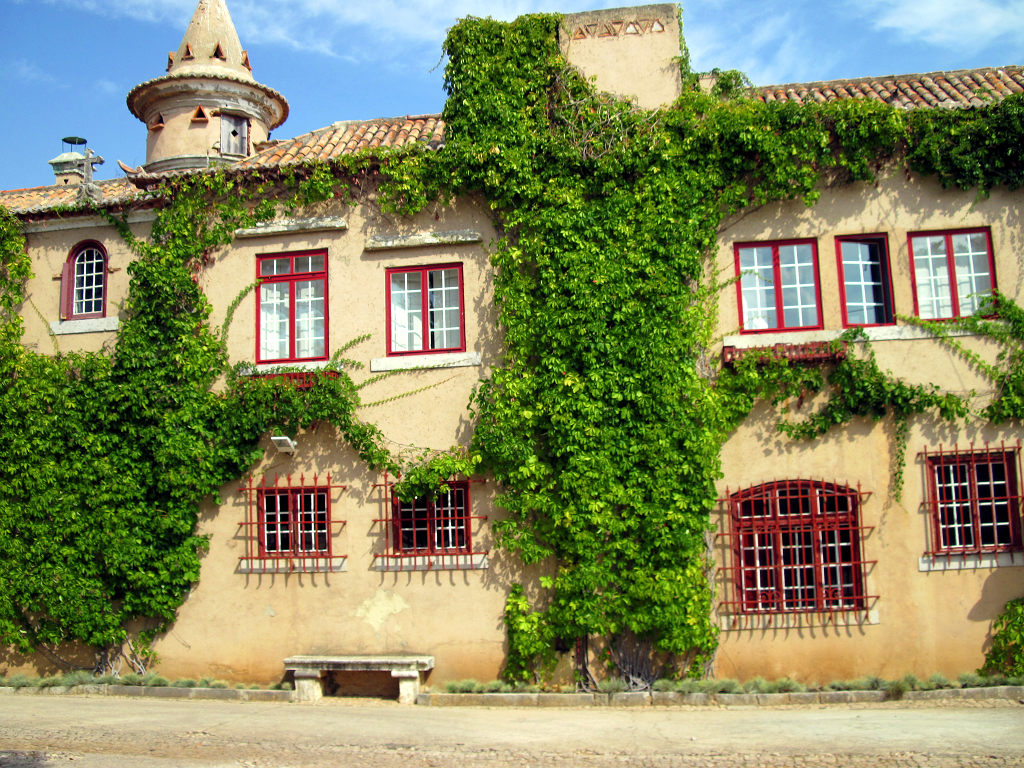 Santa Maria house in Cascais, Portugal